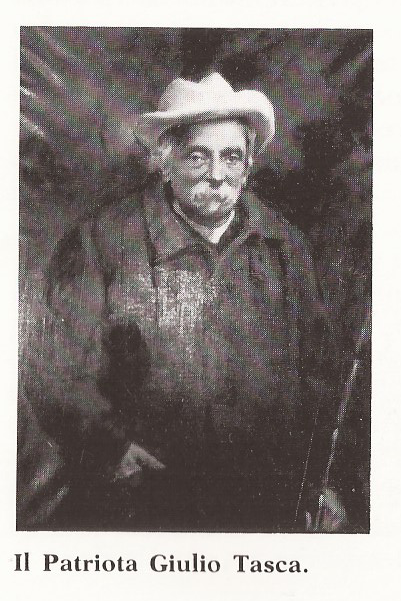 Giulio Tasca